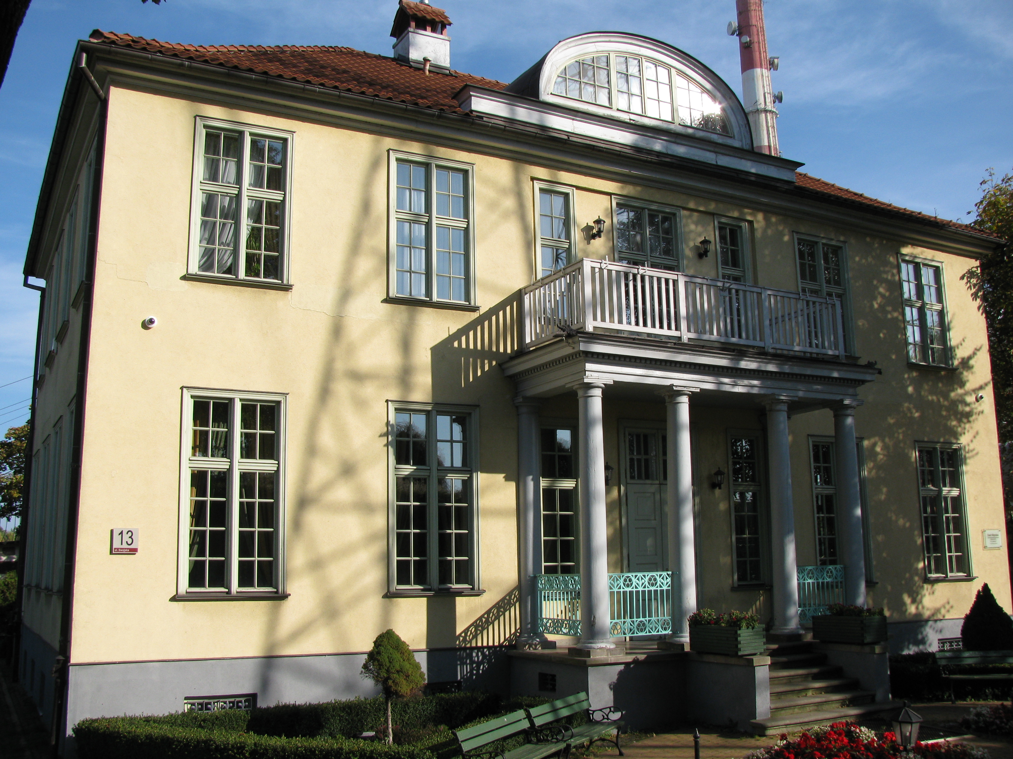 Gdańsk Młyniska, ul. Swojska 13 - Dwór "Młyniska" (zabytek nr 649 z 15.10.1973).